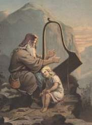 copy